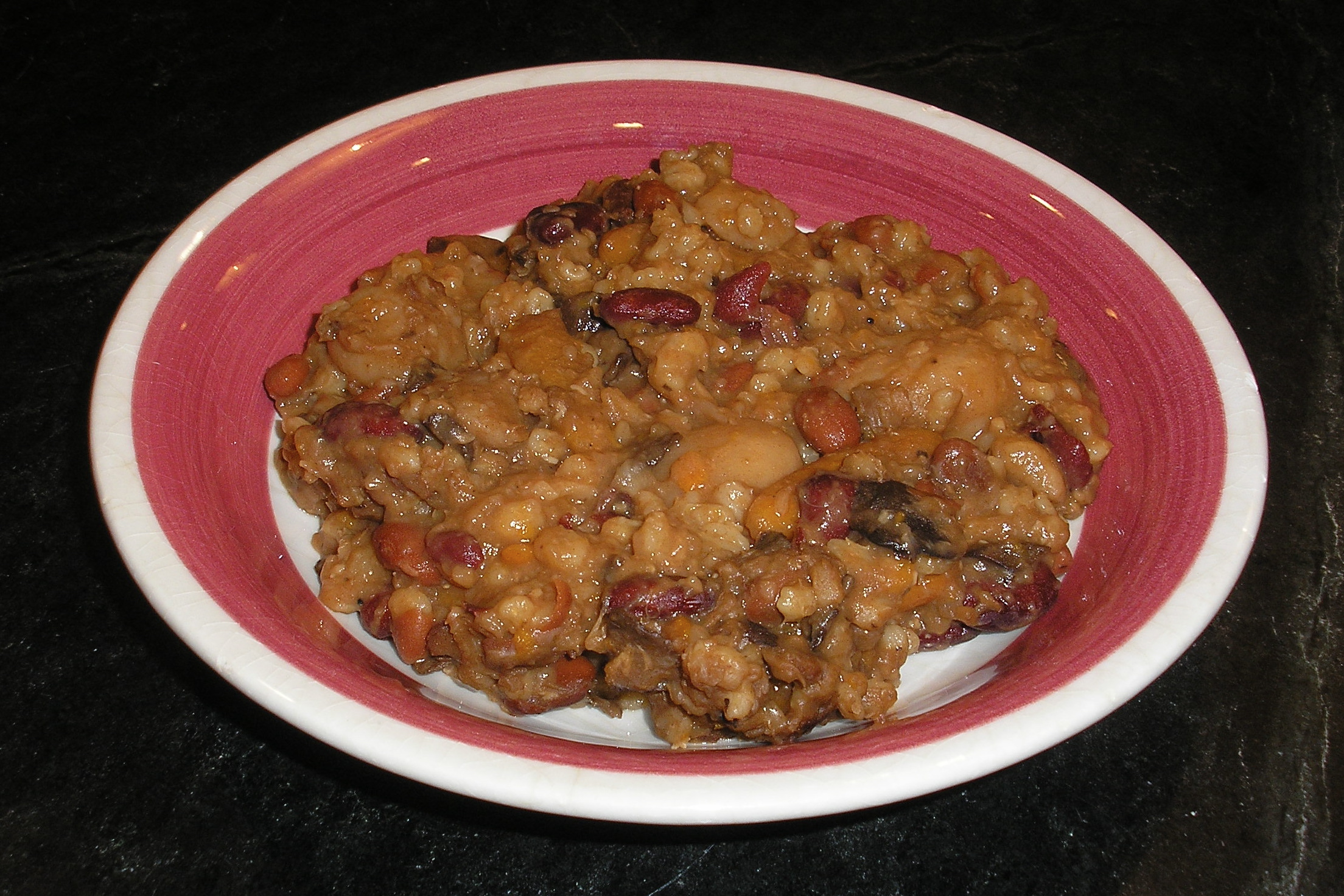 Vegetable cholent